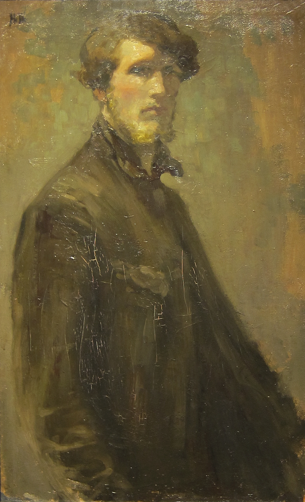 Rik Wouters (1882-1916) Zelfportret (1903-04) Schepenhuis Mechelen